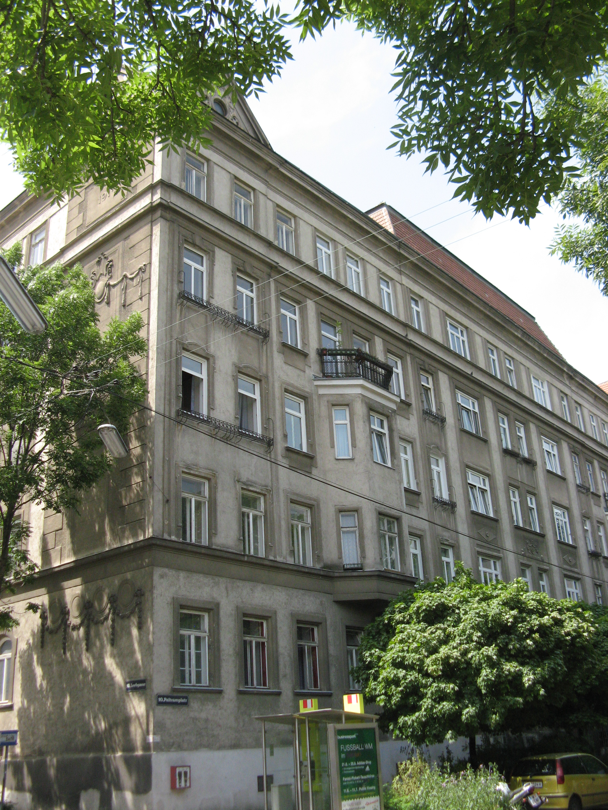 Paltramhof (1914) von Josef Sinnenberg, Paltramplatz 5-6, Wien-Favoriten